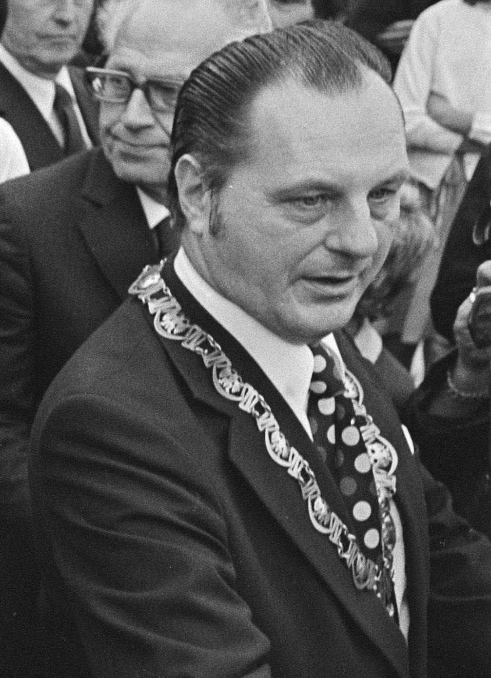 Collectie / Archief : Fotocollectie Anefo Reportage / Serie : [ onbekend ] Beschrijving : Prinses Beatrix en Prins Claus bezoeken gemeenten in Zuid Holland , Prinses Beatrix krijgt klompen voor haar kinderen, in Zevenhoven Datum : 1 september 1976 Locatie : Zevenhoven, Zuid-Holland Trefwoorden : KLOMPEN, bezoeken Persoonsnaam : Beatrix, prinses, Claus, prins Fotograaf : Verhoeff, Bert / Anefo Auteursrechthebbende : Nationaal Archief Materiaalsoort : Negatief (zwart/wit) Nummer archiefinventaris : bekijk toegang 2.24.01.05 Bestanddeelnummer : 928-7591